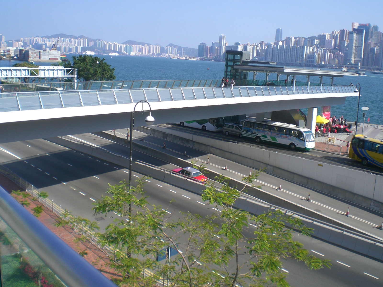 尖沙咀東海濱平台花園望zh:鯉魚門海峽